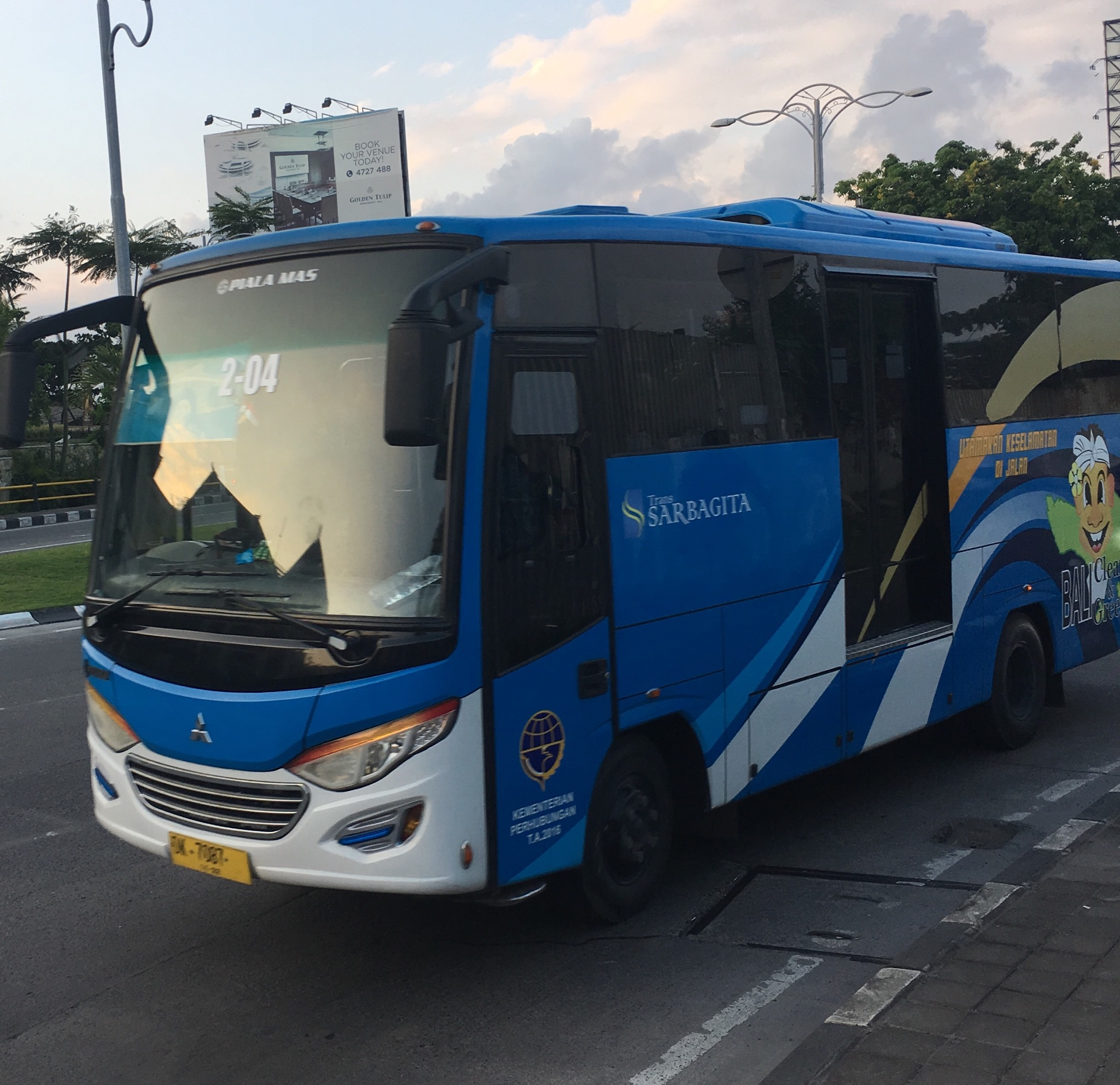 Bus Trans Sarbagita di Kabupaten Badung